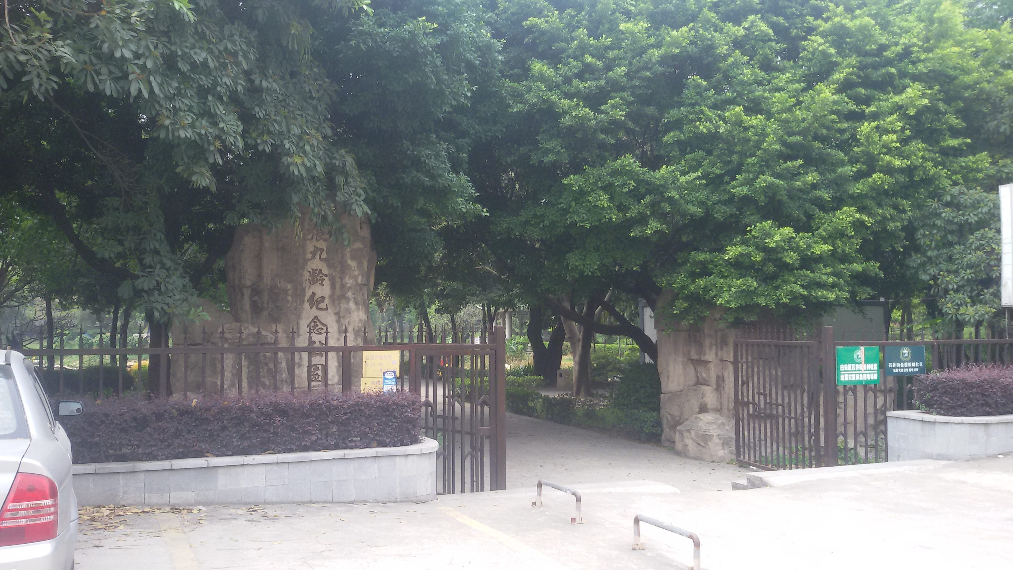 粵語: 張九齡紀念公園嘅北門